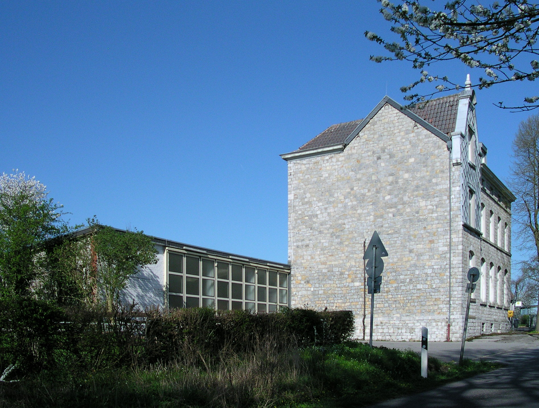 Feuerwehrhaus (frühere Schule) in Aachen Sief